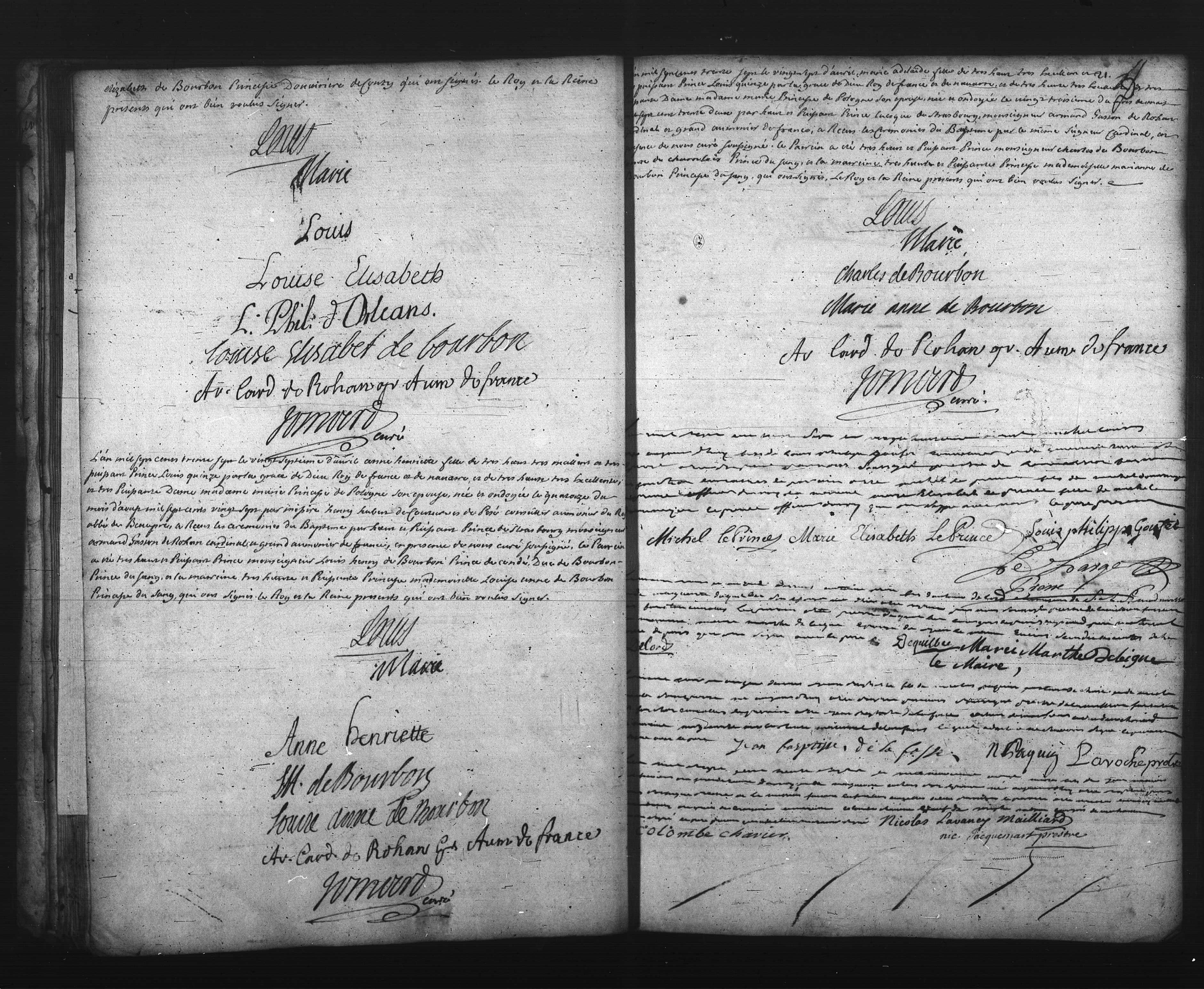 c'est une archive qui vient des yvelines